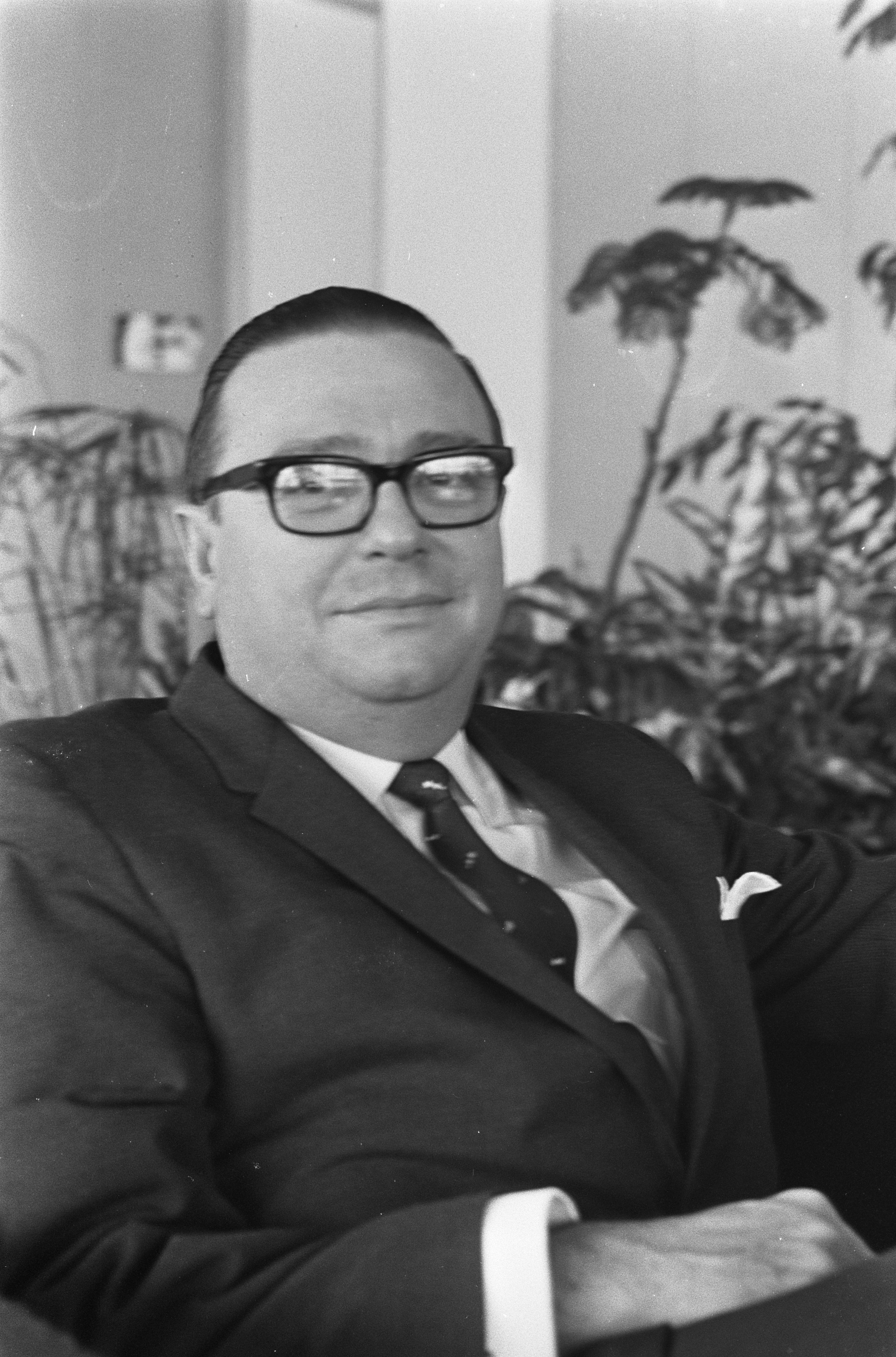 Collectie / Archief : Fotocollectie Anefo Reportage / Serie : [ onbekend ] Beschrijving : Efraïn Jonckheer, premier van de Nederlandse Antillen Annotatie : De heer Jonckheer was premier van 1954 tot 1968. Hij was oprichter van de DP (Democratische Partij) Datum : 26 juni 1967 Locatie : Nederlandse Antillen Trefwoorden : ministers-presidenten, portretten, premiers Persoonsnaam : Jonckheer, E. Fotograaf : Merk, Ben / Anefo Auteursrechthebbende : Nationaal Archief Materiaalsoort : Negatief (zwart/wit) Nummer archiefinventaris : bekijk toegang 2.24.01.05 Bestanddeelnummer : 920-4404